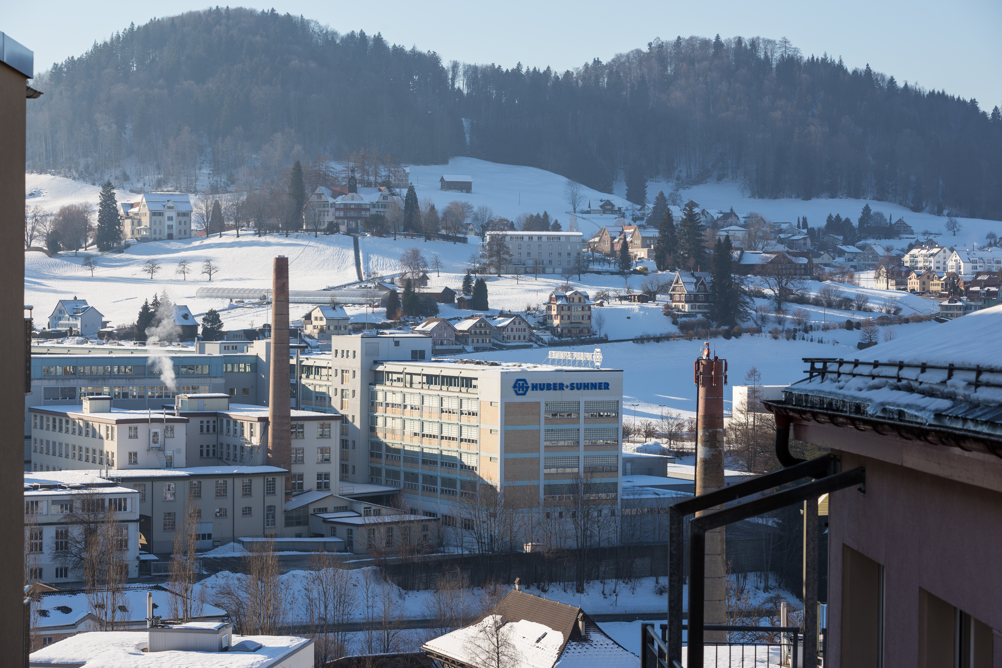 Blick auf die Fabrikanlagen von Huber+Suhner in Herisau